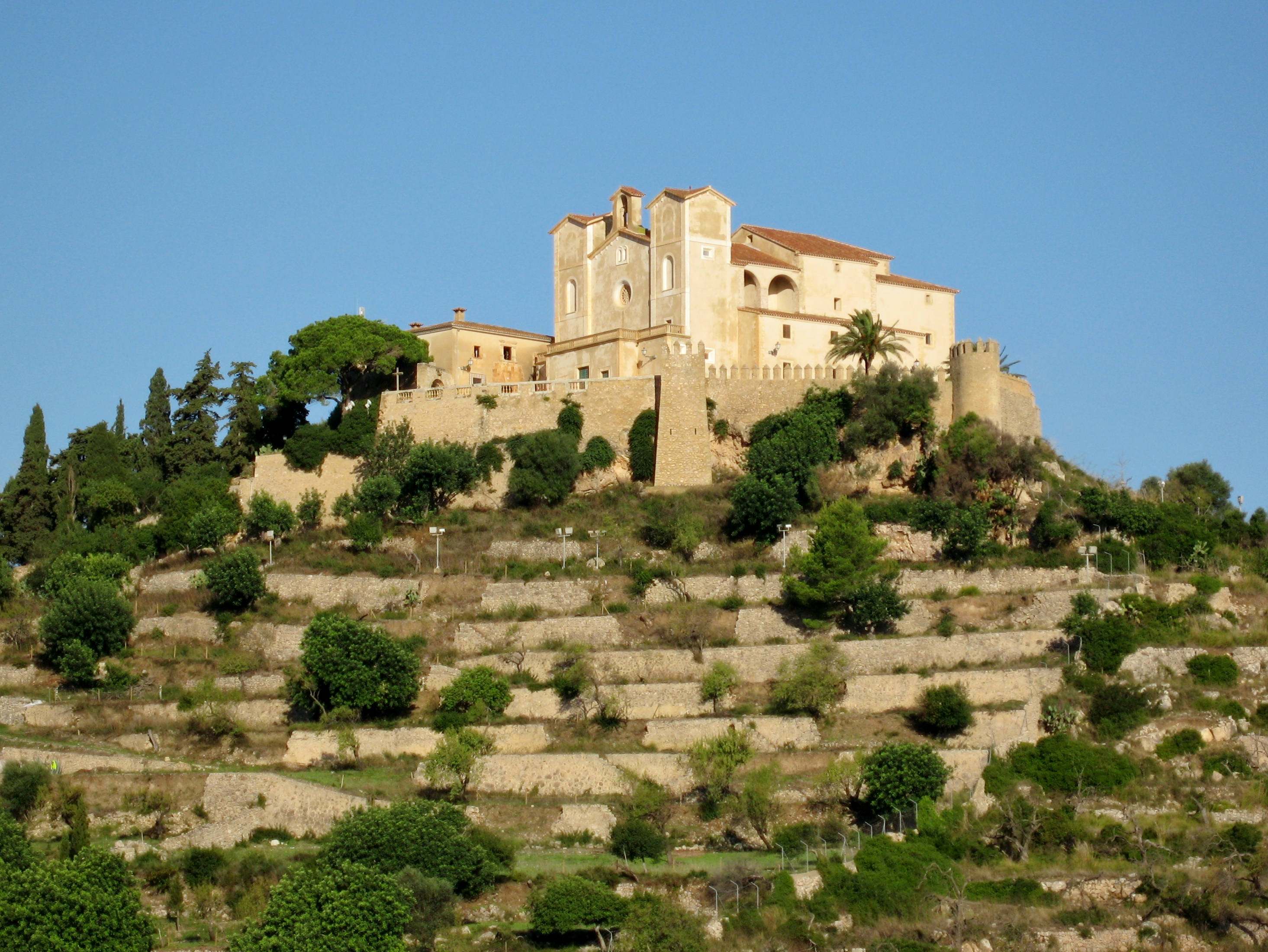 Santuari de Sant Salvador, Artà, Mallorca, Spain